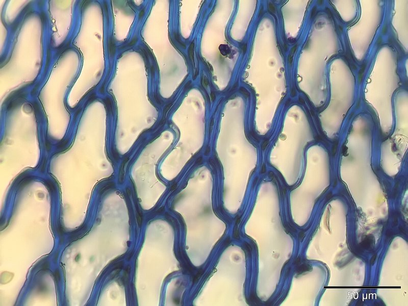 Sphagnum fimbriatum, Stammblatt-Zellen, 400x